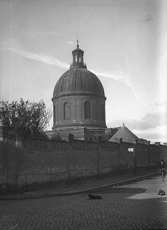 Inscription sur enveloppe : "Toulouse : dôme de l'hôpital La grave 9 oct. 1901 app. Zion pl. Jougla v. "